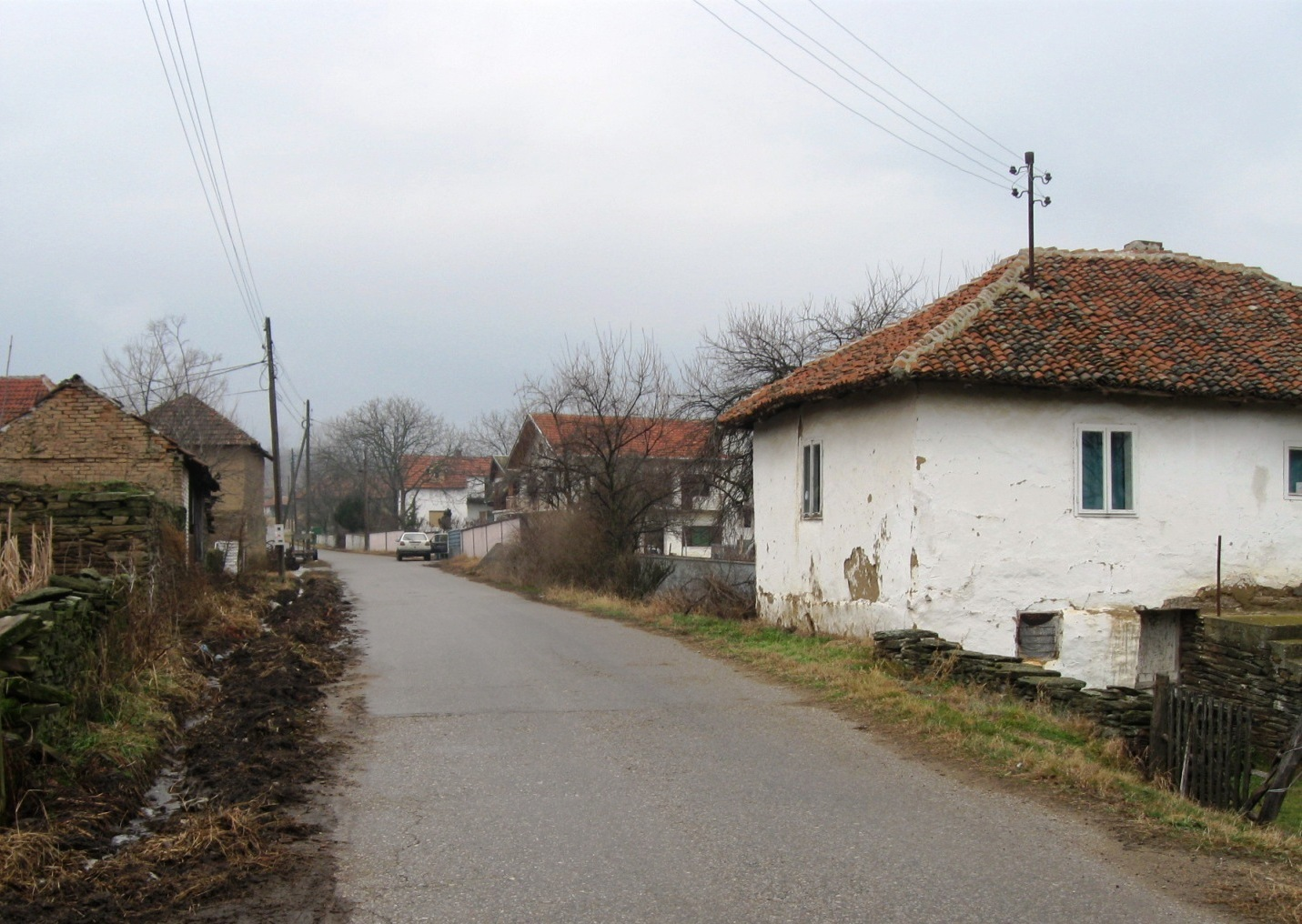 Ulica u Savincu